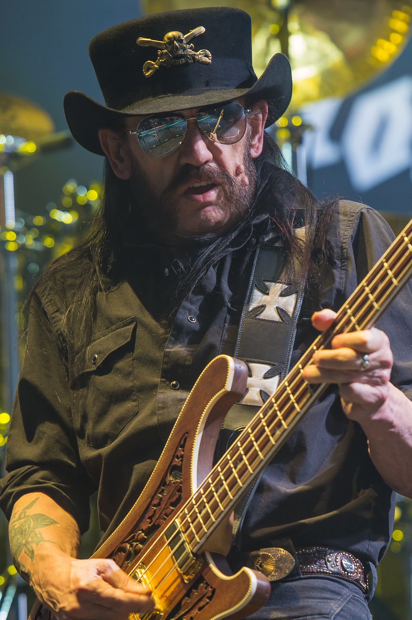 ARGO-Konzerte,Beck's Park Stage,Festival,Ian Fraser „Lemmy“ Kilmister,Konzert,Lemmy Kilmister,Livekonzert,Livemusik,Motörhead,Musik,RiP,Rock im Park 2015